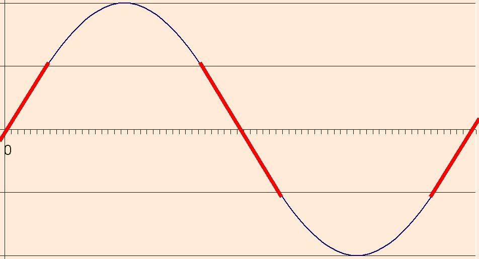 Door de auteur zelf vervaardigde afbeelding.